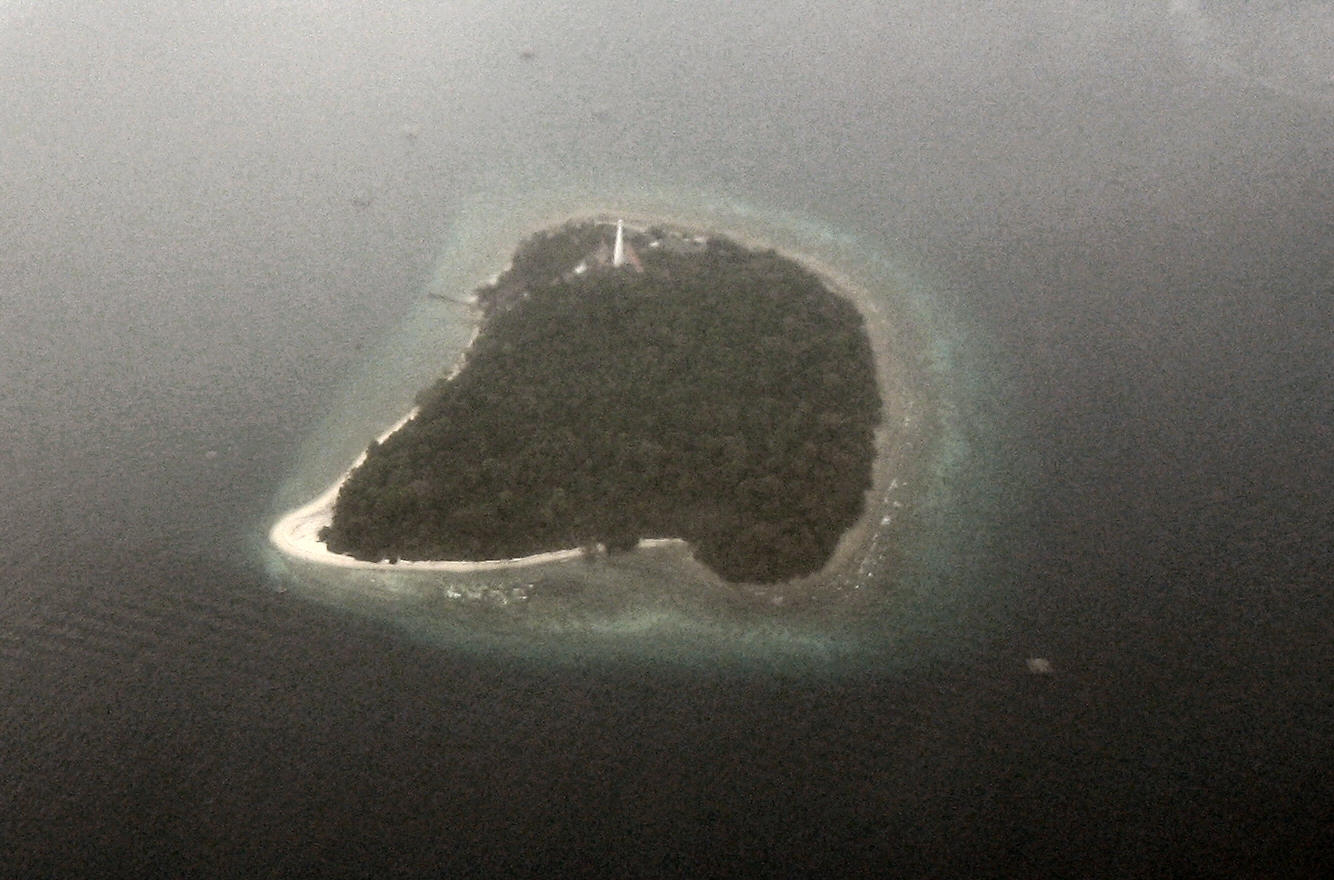 Pulau seribu | Damar Besar / Edam / Damar Tengah Picture taken by Hullie November 2006